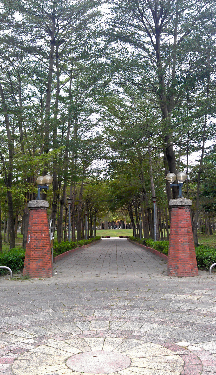 北屯舊社公園